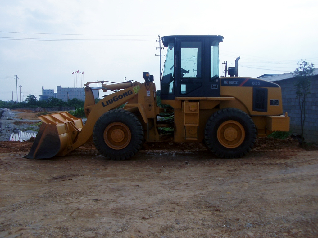 柳工835装载机停放在桂林东站附近